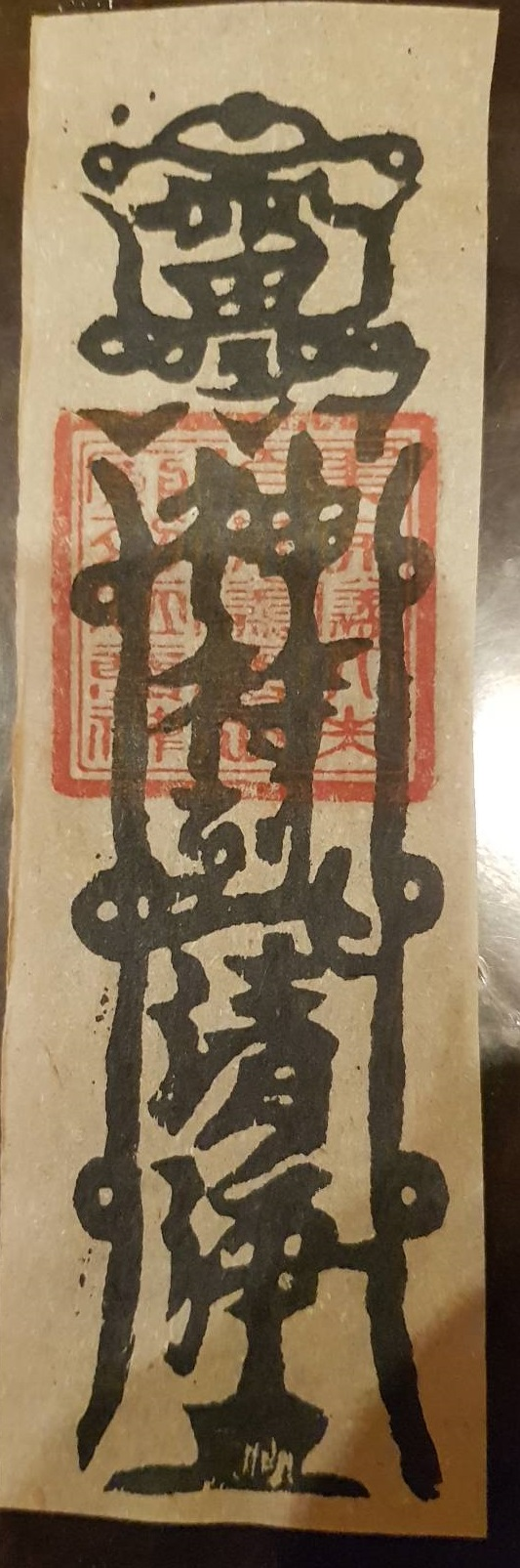 此為深坑集順廟向信眾發放的淨符，亦可作平安符。